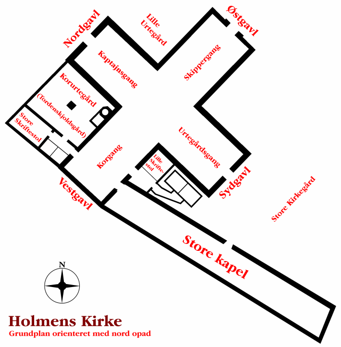 Holmens Kirke, Copenhagen, Denmark . Plantegning med nord opad.